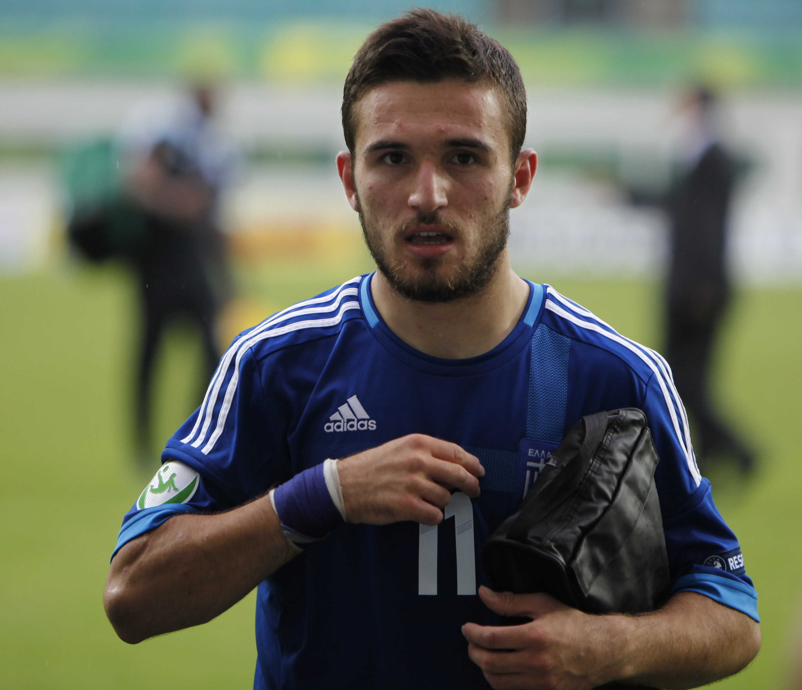 Giannis Giannotas en 2012